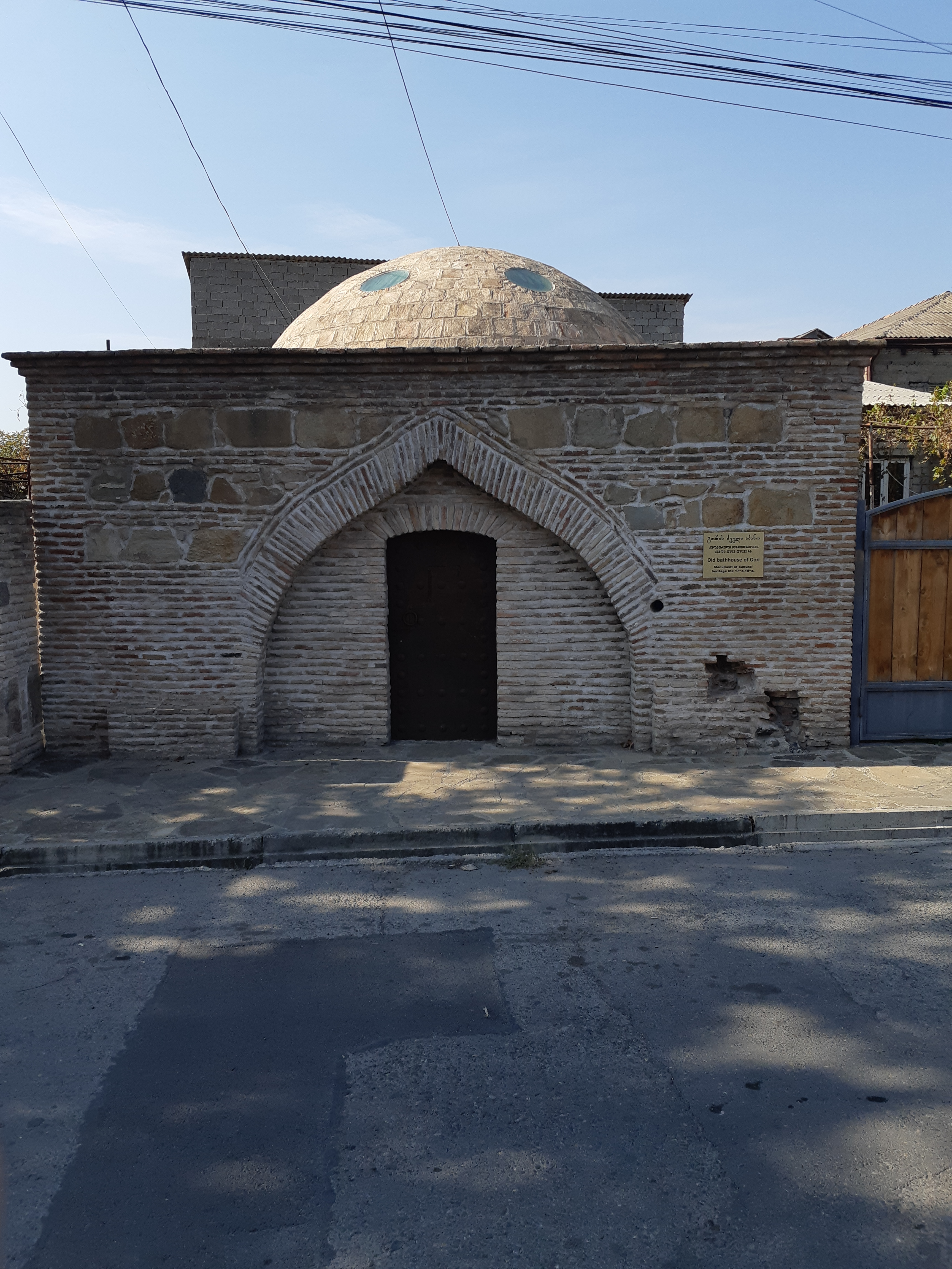 „ერეკლეს აბანო“ ქალაქ გორში